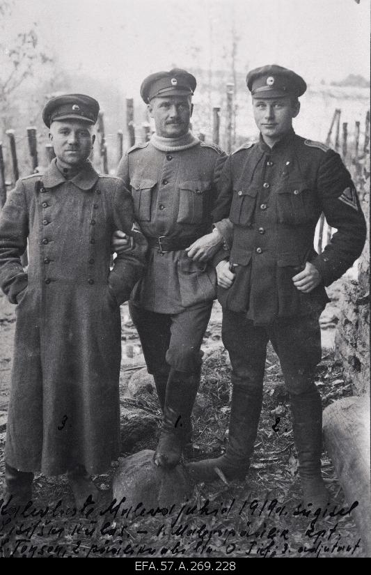 Eesti Vabadussõda. Kalevlaste Maleva Pataljoni juhtkond Lissitški külas. Vasakult: pataljoni adjutant leitnant Johannes Aro, pataljoni ülem leitnant Leopold Tõnson, pataljoni ülema abi leitnant Otto Tief.